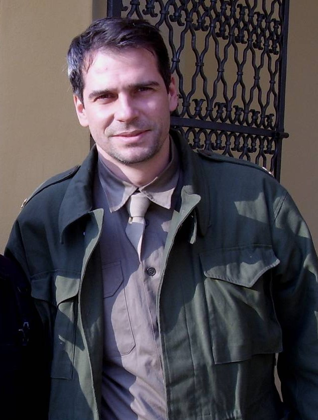 Paweł Deląg (ur. 29.04.1970 roku w Krakowie) - polski aktor filmowy, telewizyjny i teatralny.